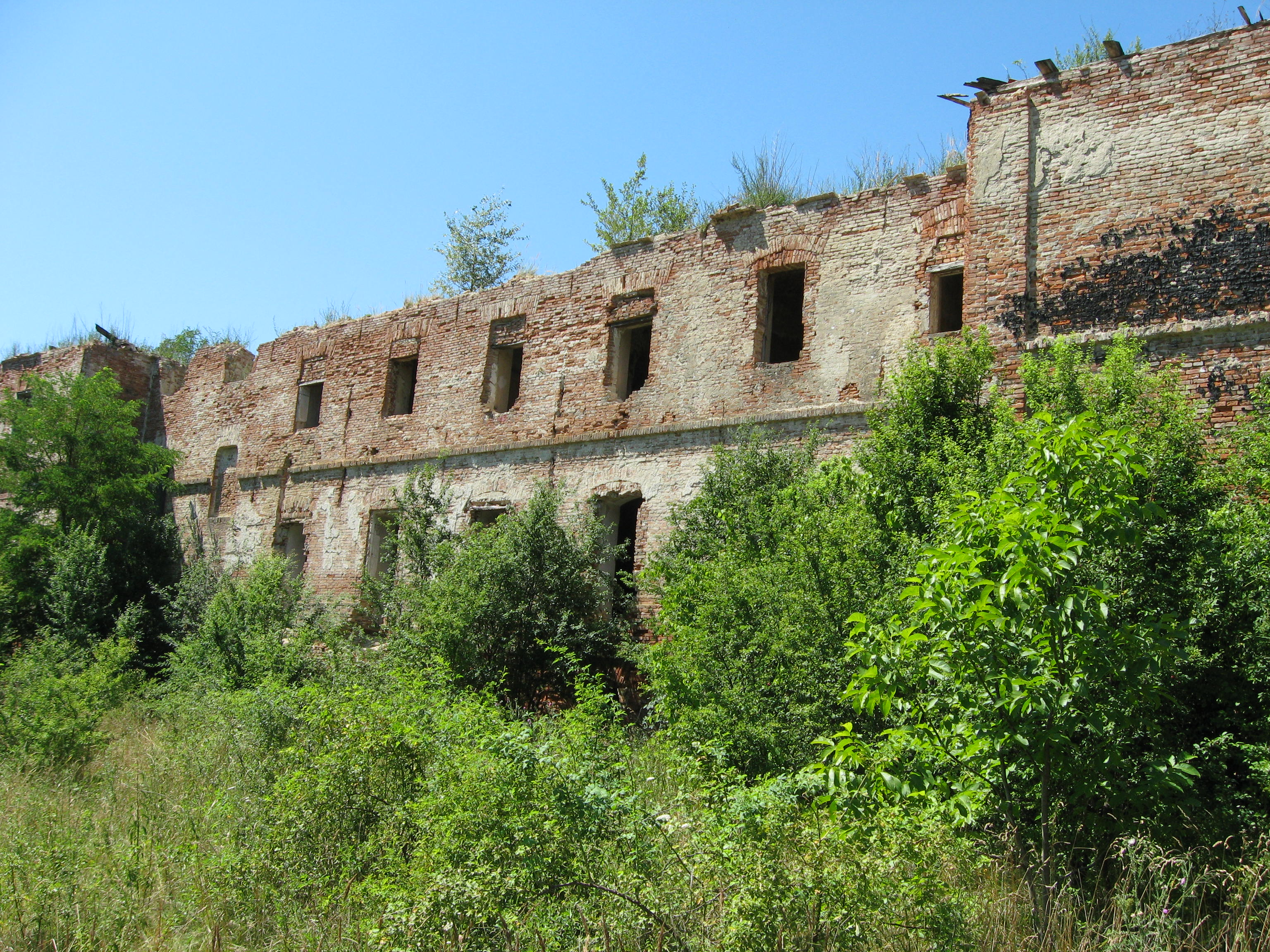 a Máriacsaládi zárda 2007-ben